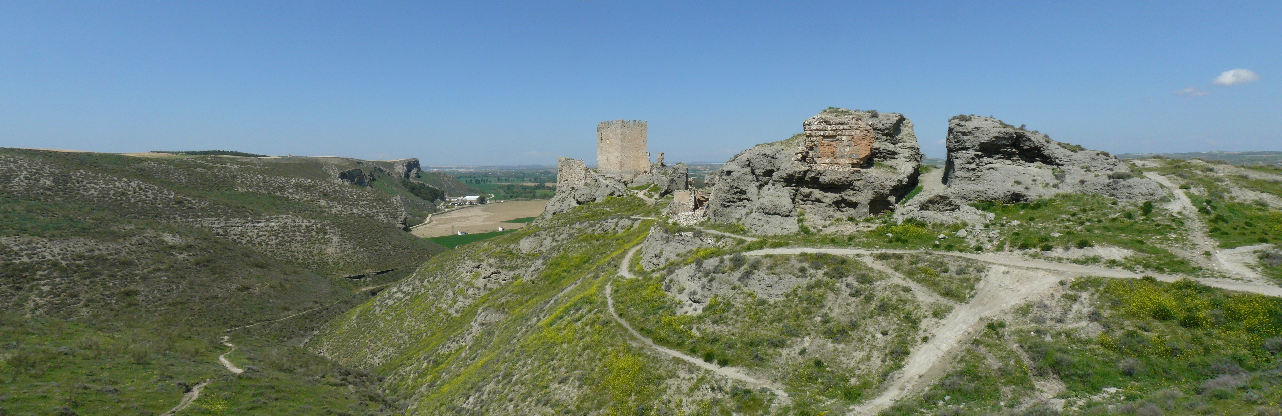 Castillo de oreja, Toledo.